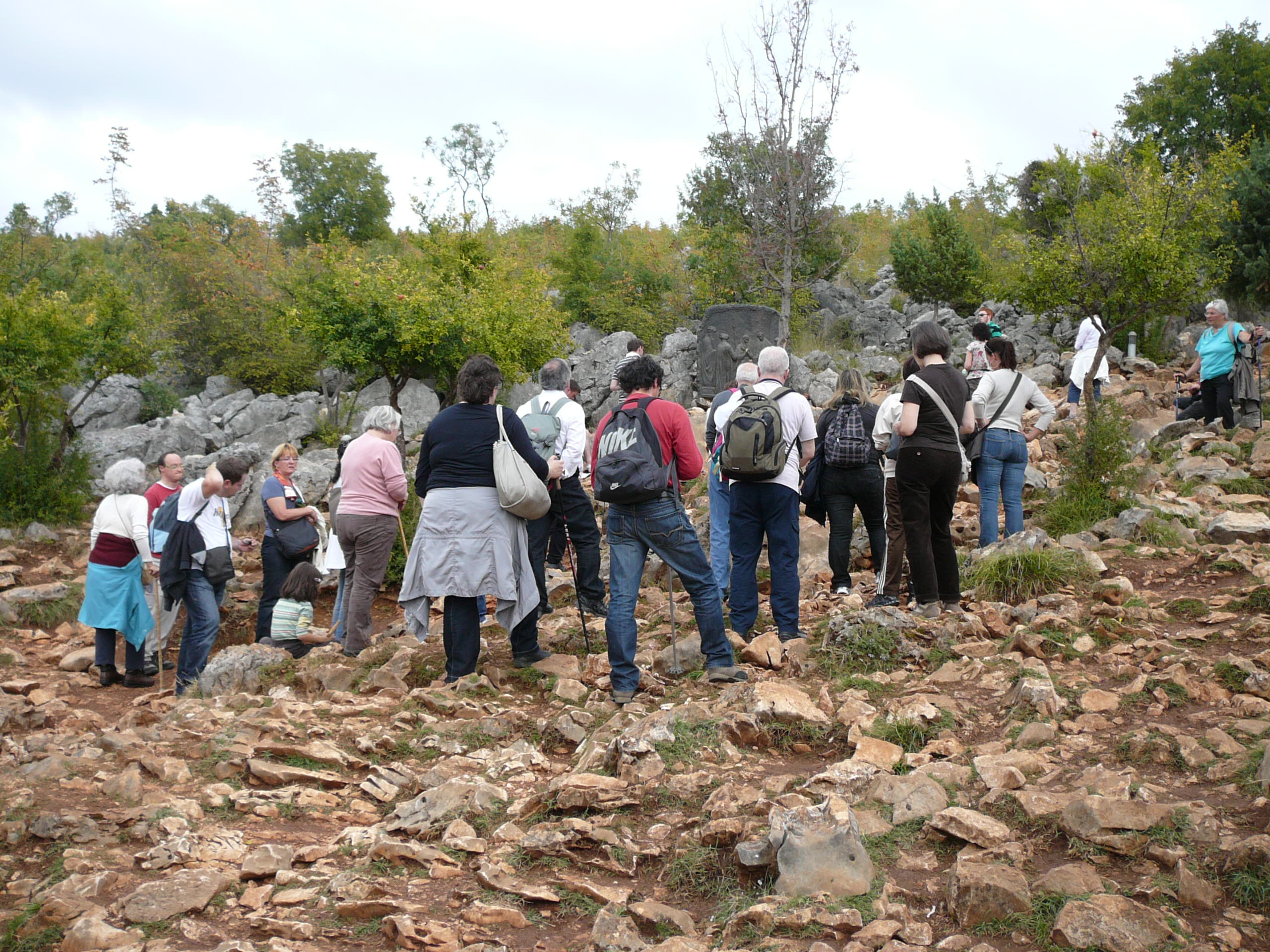 Il sentiero che sale sul Podbro